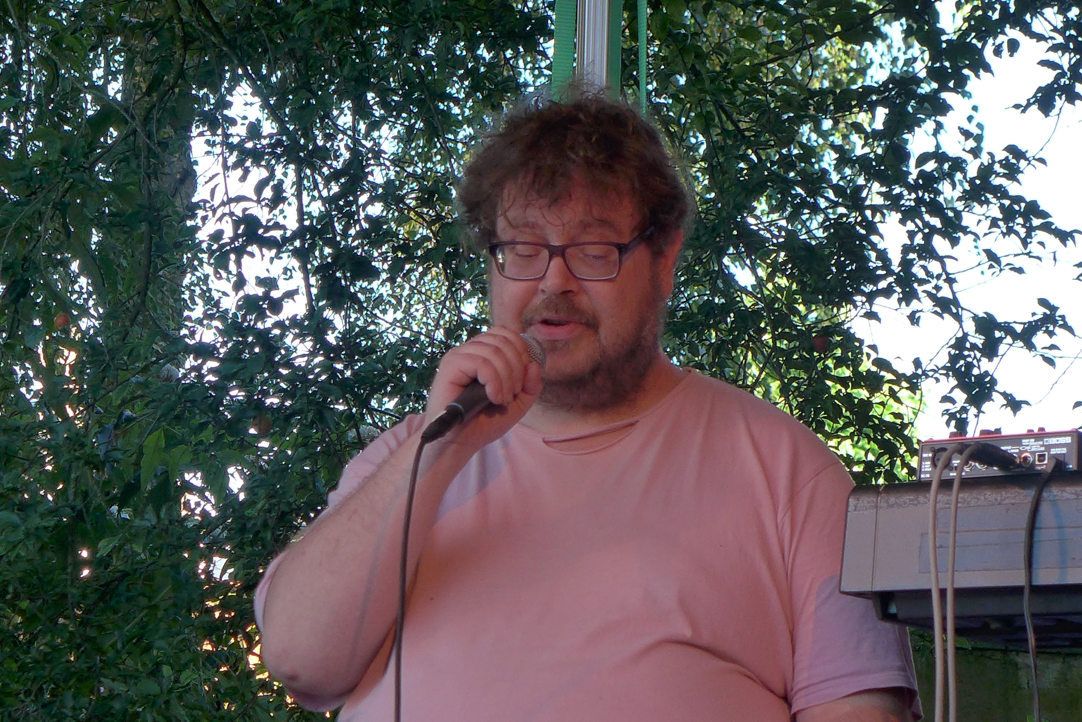 Martijn Benders op het poëziefestival Het Tuinfeest in Deventer, 6 augustus 2016